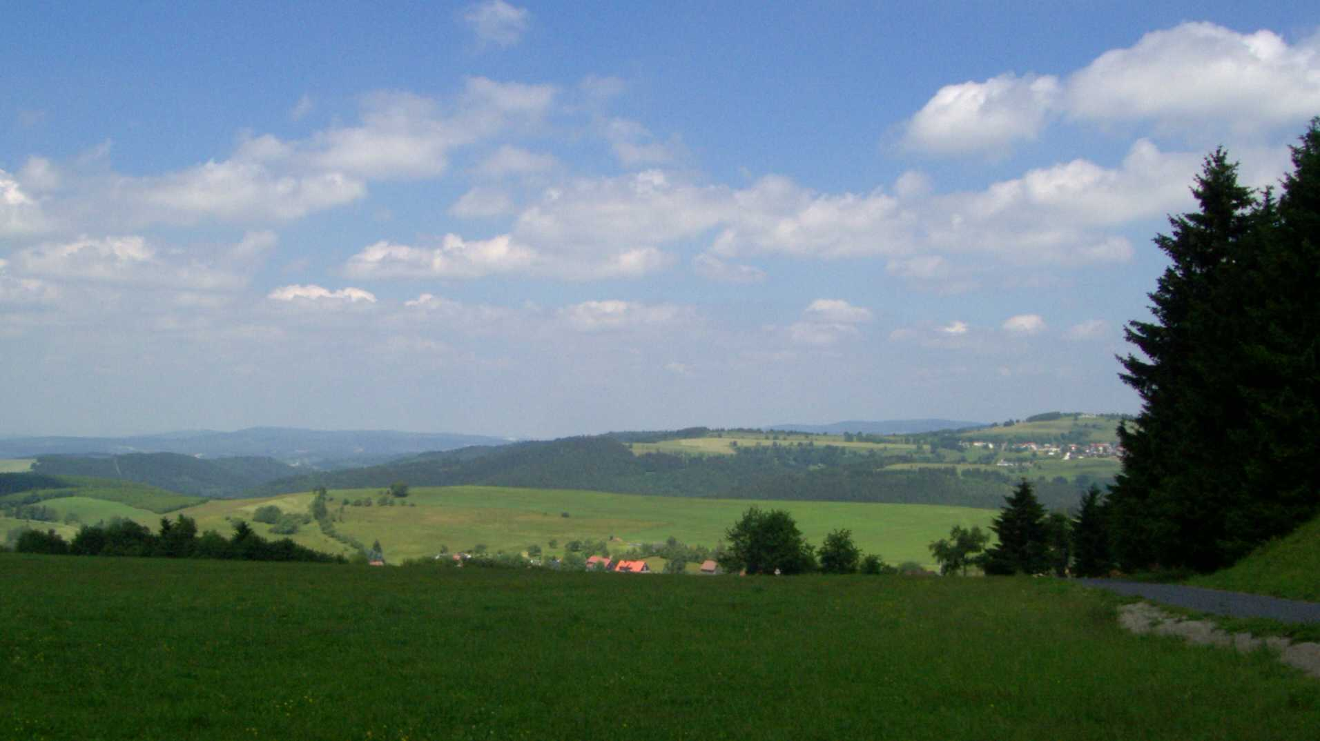 Blick vom Eckartsberg auf Schnett und den Simmersberg (781m, rechts) mit seinem Nebengipfel Kohlberg (718m, Mitte). Dazwischen ist im Hintergrund der Adlersberg (849m) mit dem Neuhäuser Hügel (891m) erkennbar. Links des Kohlberges folgen im Hintergrund das Gewerbegebiet Suhl-Friedberg und der Kleine Thüringer Wald mit Schleusinger Berg (671m) und Schneeberg (692m). Mittig im Vordergrund der Ort Waffenrod-Hinterrod.